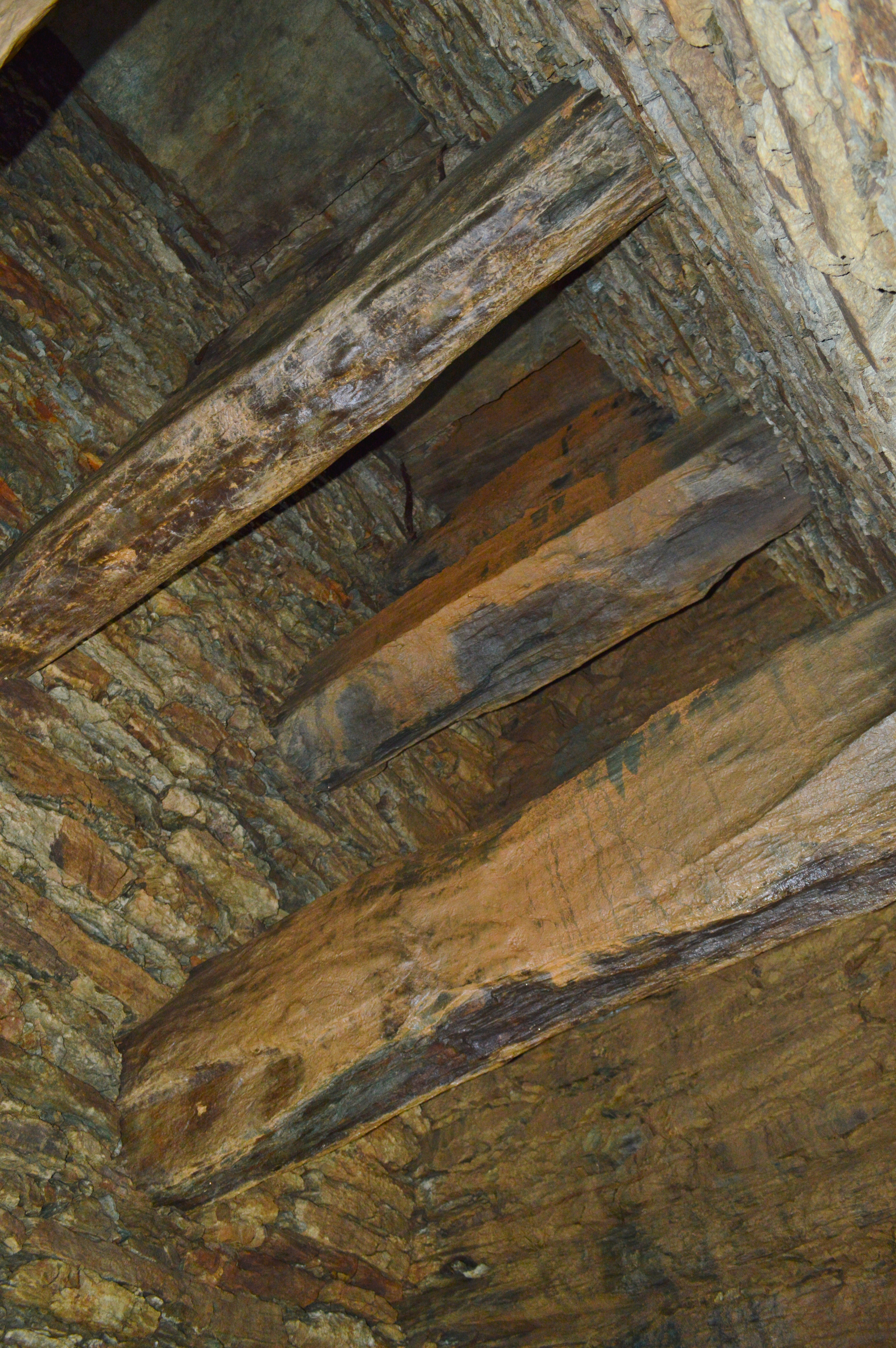 天王塚古墳 (和歌山市) 石室玄室上方